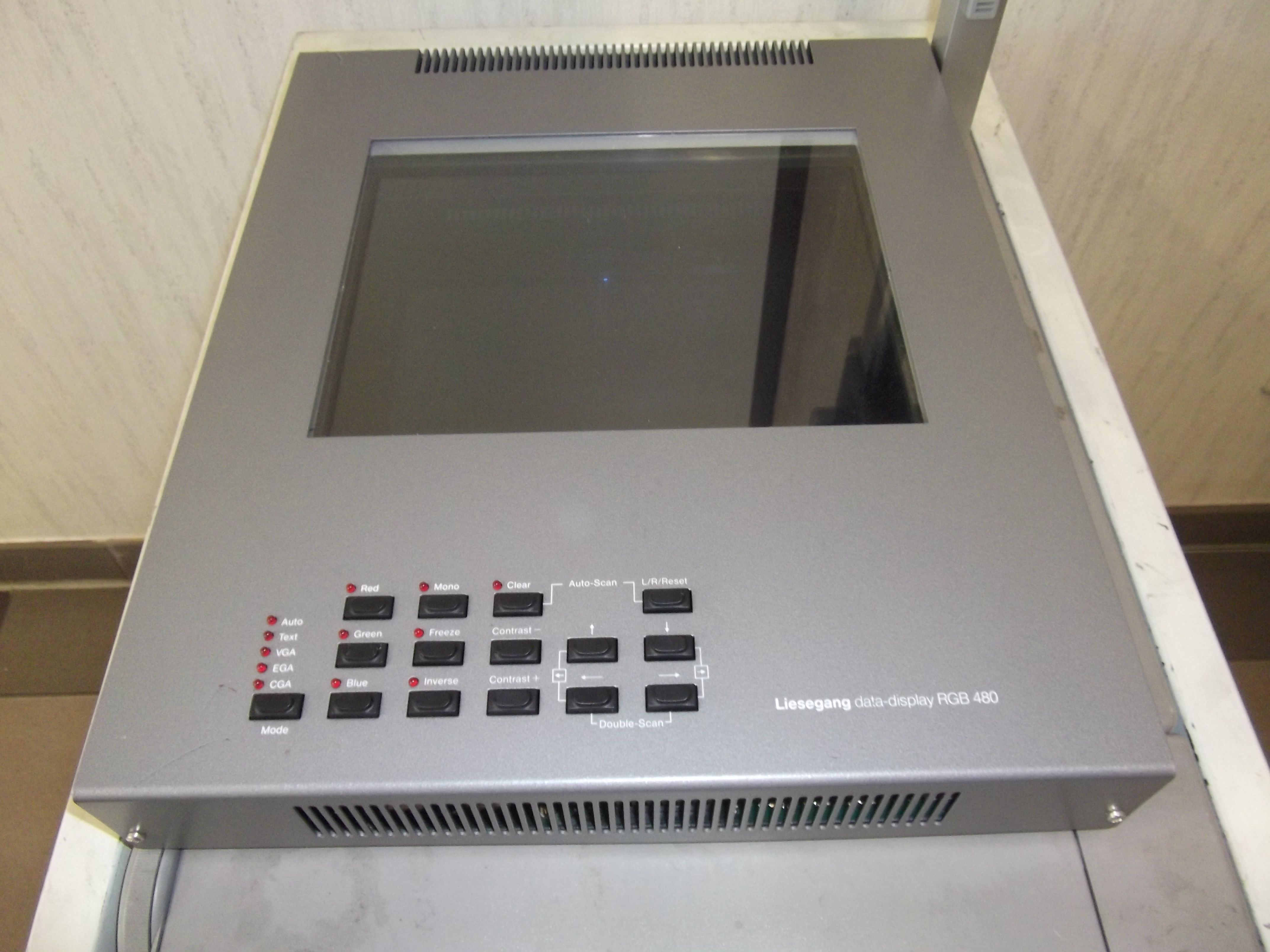 Liesegang Datendisplay RGB 480, Auflage-LCD für Overheadprojektoren, gefertigt bei Liesegang in Düsseldorf, ab 1989